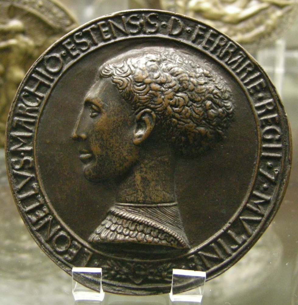 CdM, pisanello, medaglia di leonello d'este recto